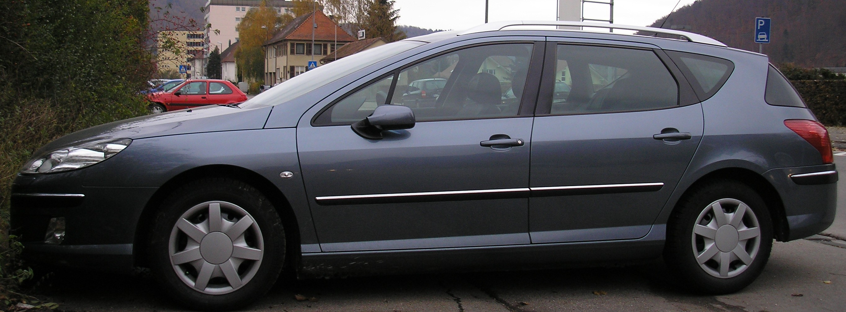 Peugeot 407 SW 2005